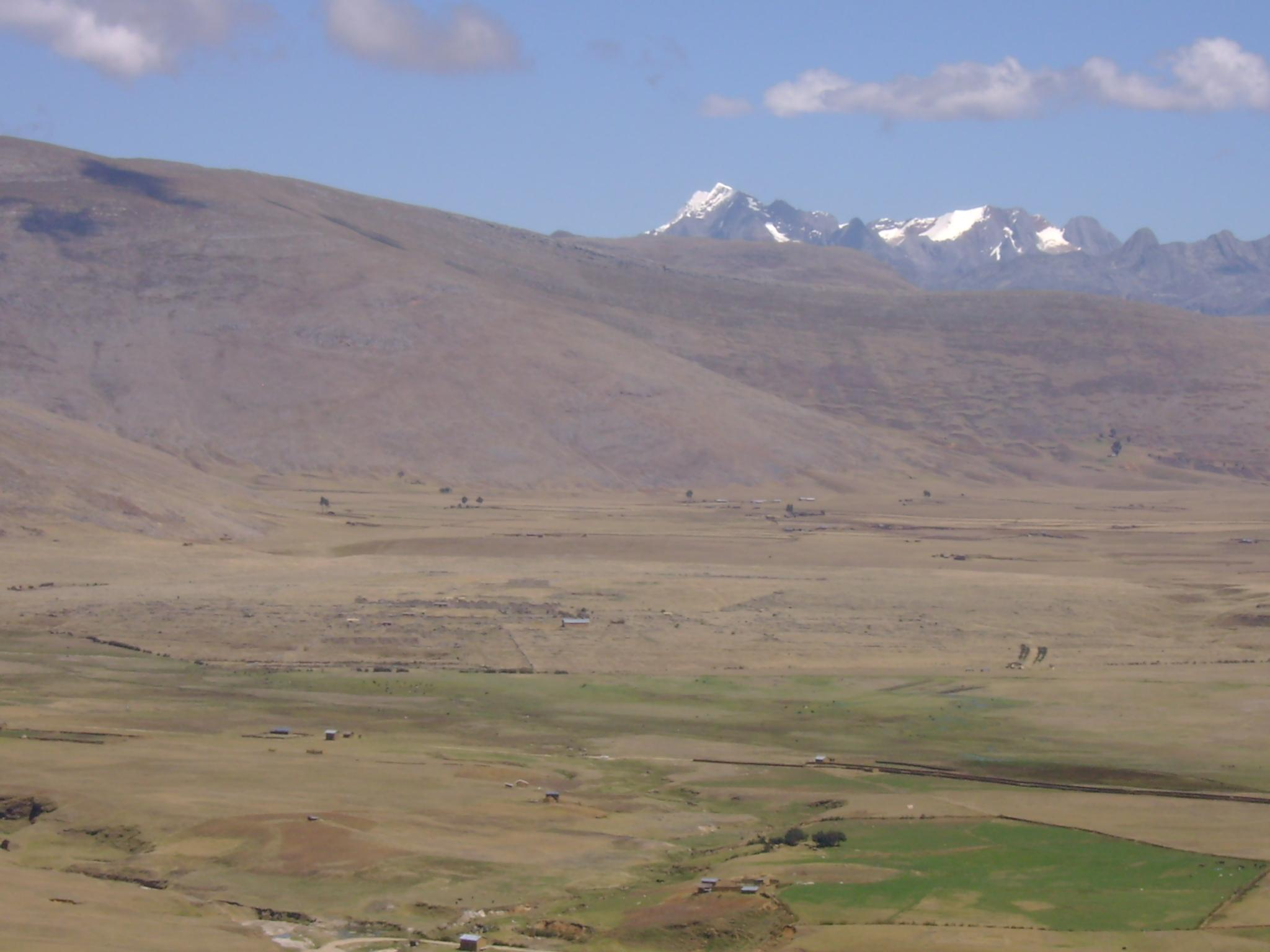 Ruinas de Huanuco Marka.